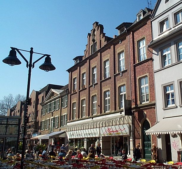 Häuser in der Kölner Straße in Leverkusen-Opladen. Die beiden Häuser beherbergten im 19. Jahrhundert Internat und Schulgebäude des Aloysianums.